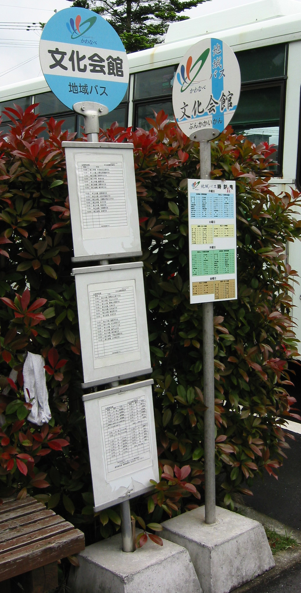 川辺町地域バス（鹿児島県）のバス停